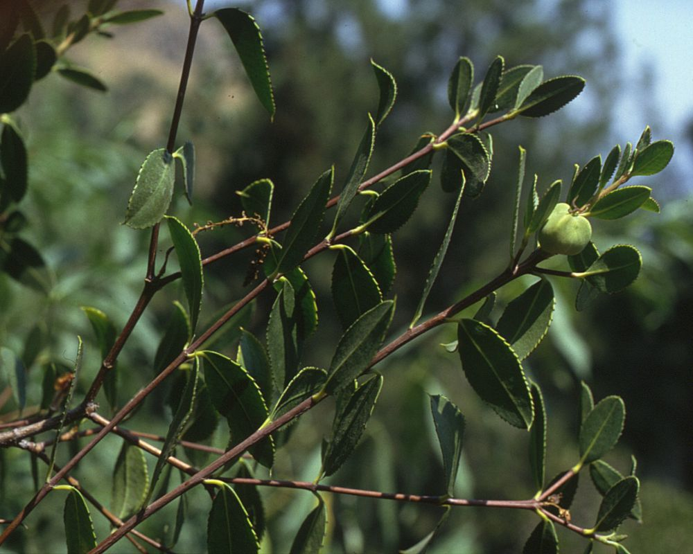 Colliguaja odorifera, Wolfsmilchgewächse (Euphorbiaceae) - Chile, Santiago de Chile, Cerro San Cristóbal